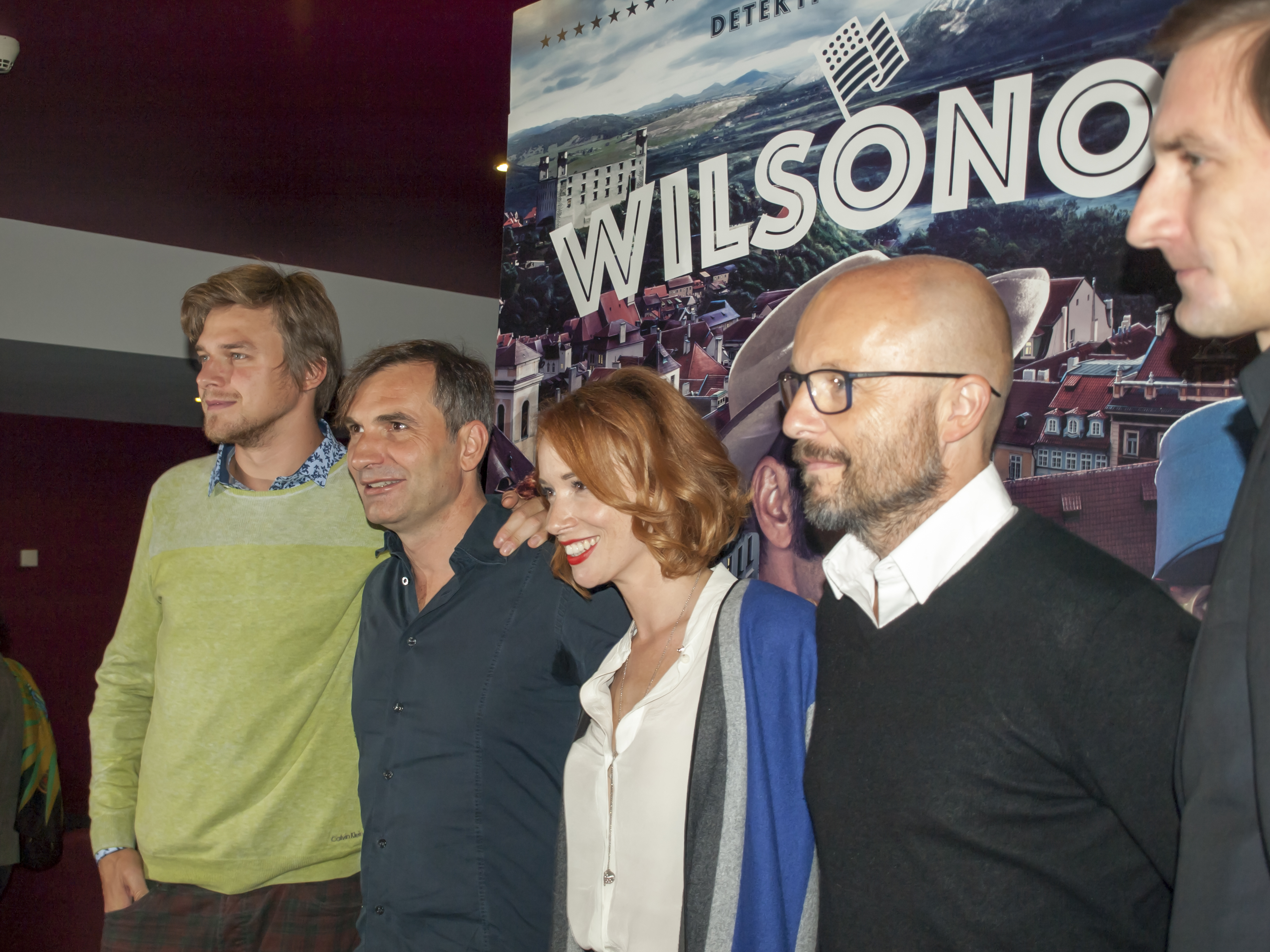 Fotky z novinářské konference 15.9.2015. Autor: Blanka Borová (Karolína Černá) pro Kritiky.cz & [ 10Mpix.cz